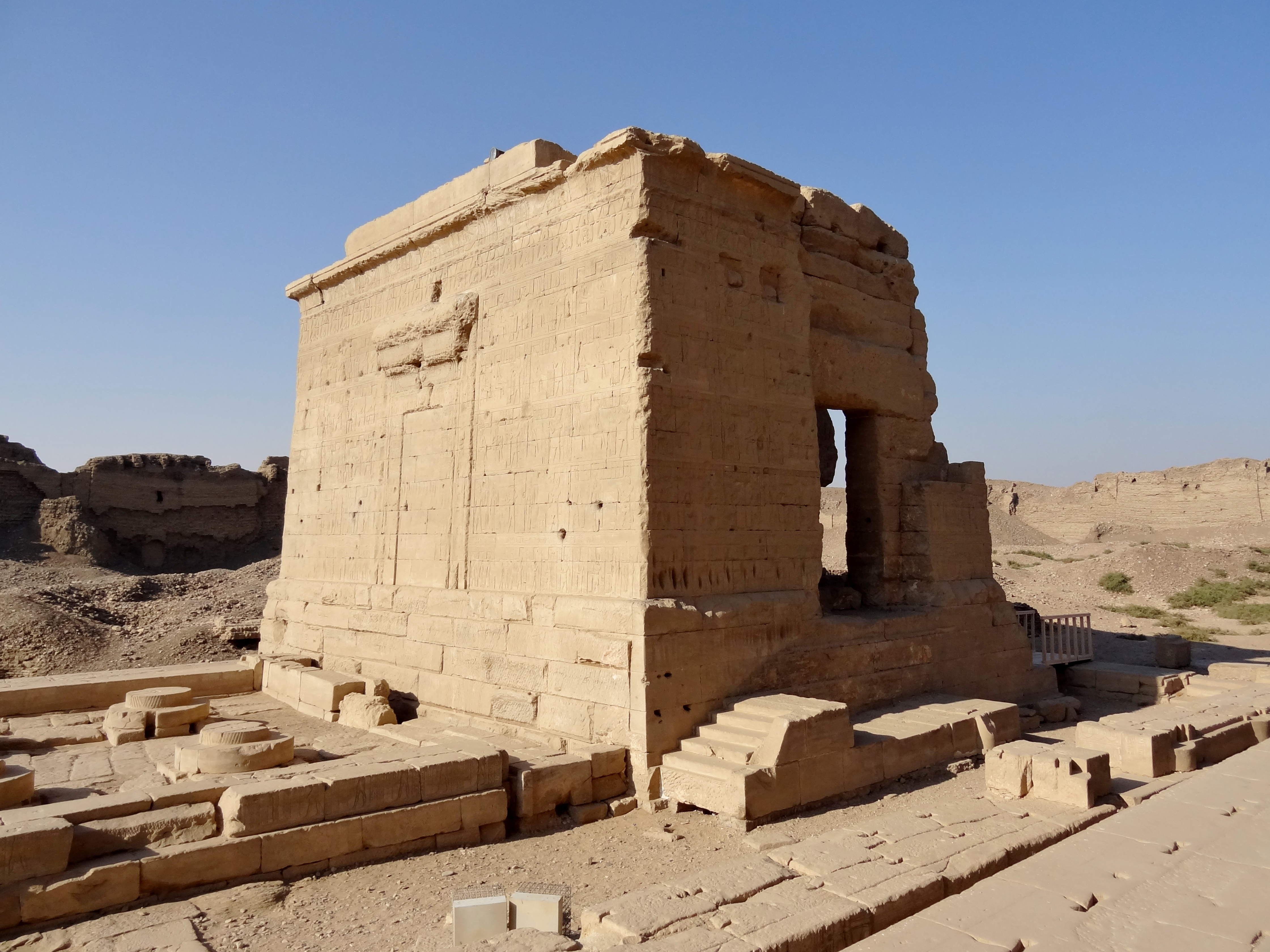 Geburtstempel der Isis im Tempelkomplex von Dendera, Ägypten